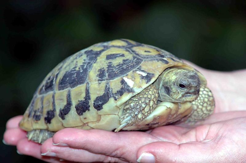 Weibchen einer Zwergform, Griechische Landschildkröte (Testudo hermanni)